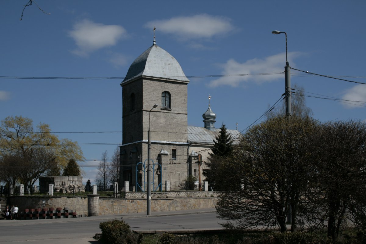 Надставна церква у Тернополі